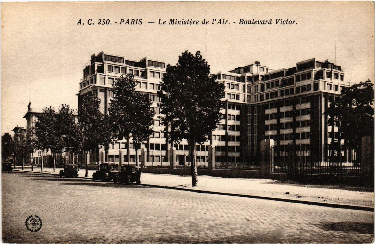 Le ministère de l'Air, boulevard Victor, vers les années 1930